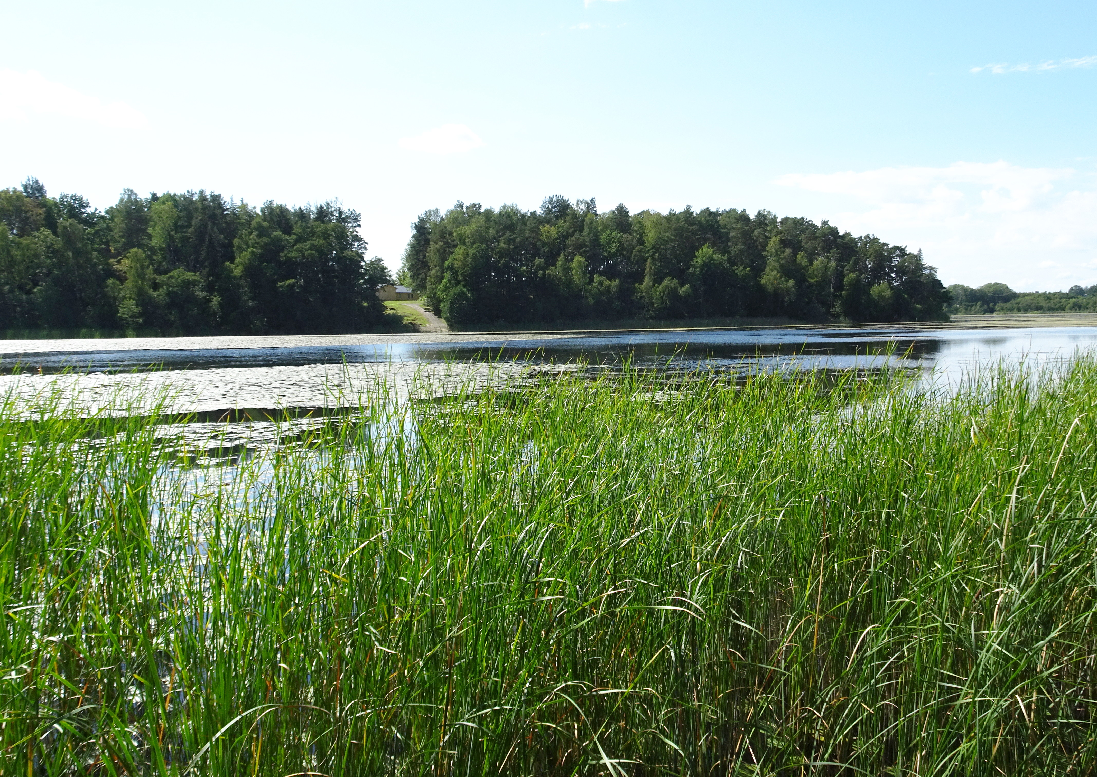 Norra delen av sjön Aspen (Prästviken) med Asptuna i bakgrunden